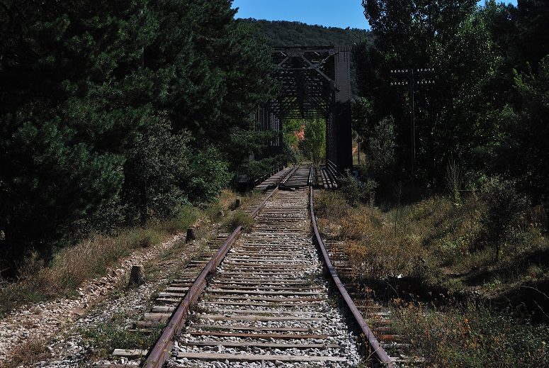 Puente sobre el rio Duero a la salida de Soria en dirección a Castejon de Ebro de la linea de ferrocarril entre las dos poblaciones